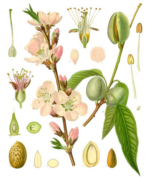 Mandelbaum. A B blühender und fruchtender Zweig, natürl. Grösse; 1 und 1a Blüthen von verschiedenen Bäumen, vergrössert (1a aus dem botanischen Garten in Jena); 2, 2a Kronblätter, natürl. Grösse; 3 Staubgefässe, desgl.; 4 Pollen, desgl.; 5 Stempel, desgl.; 6, 7 Fruchtknoten im Längs- und Querschnitt, desgl.; 8 Steinkern, desgl.; 9 derselbe im Längsschnitt, desgl.; 10 Mandel ohne Steinschale, desgl.; 11, 12 Same im Längs- und Querschnitt, desgl. Die abgebildete Mandel ist irrtümlicherweise als var. amara bezeichnet; es muss heissen var. dulces.